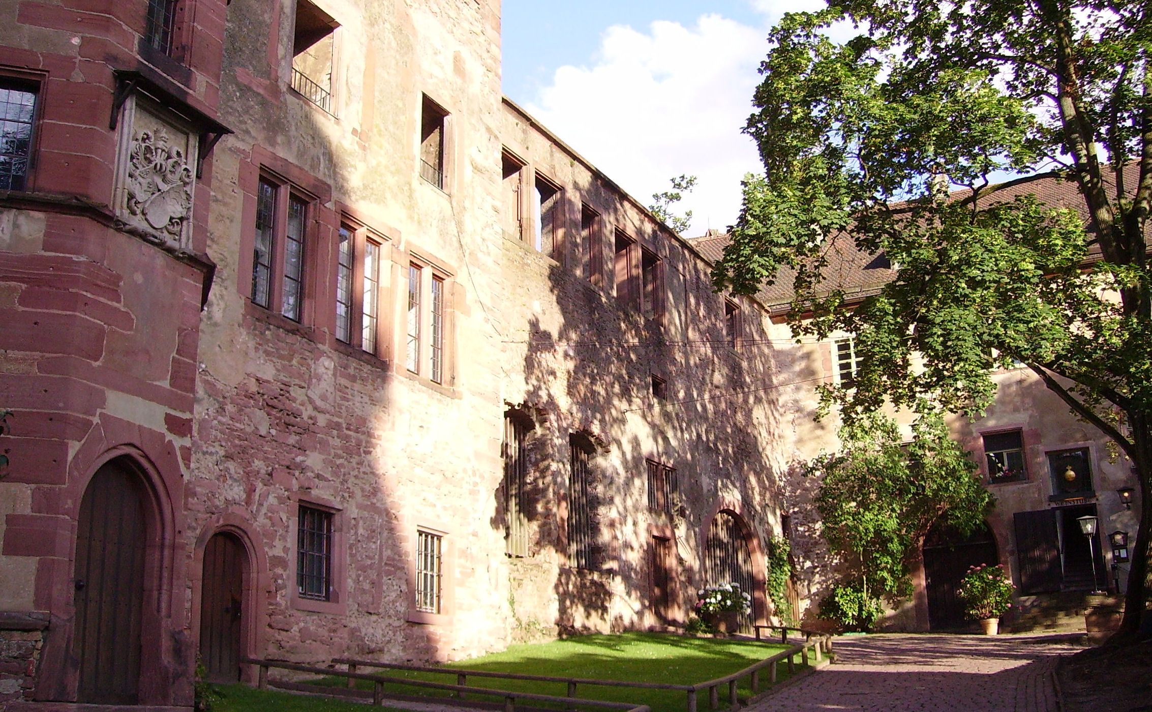 Heidelberger Schloss